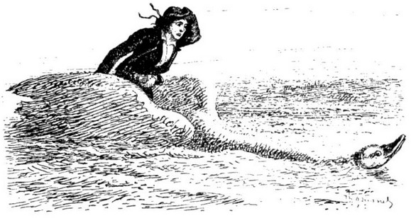 Illustration de Théophile Busnel pour le conte d'Emile Souvestre, la Groac'h de l'île du Lok